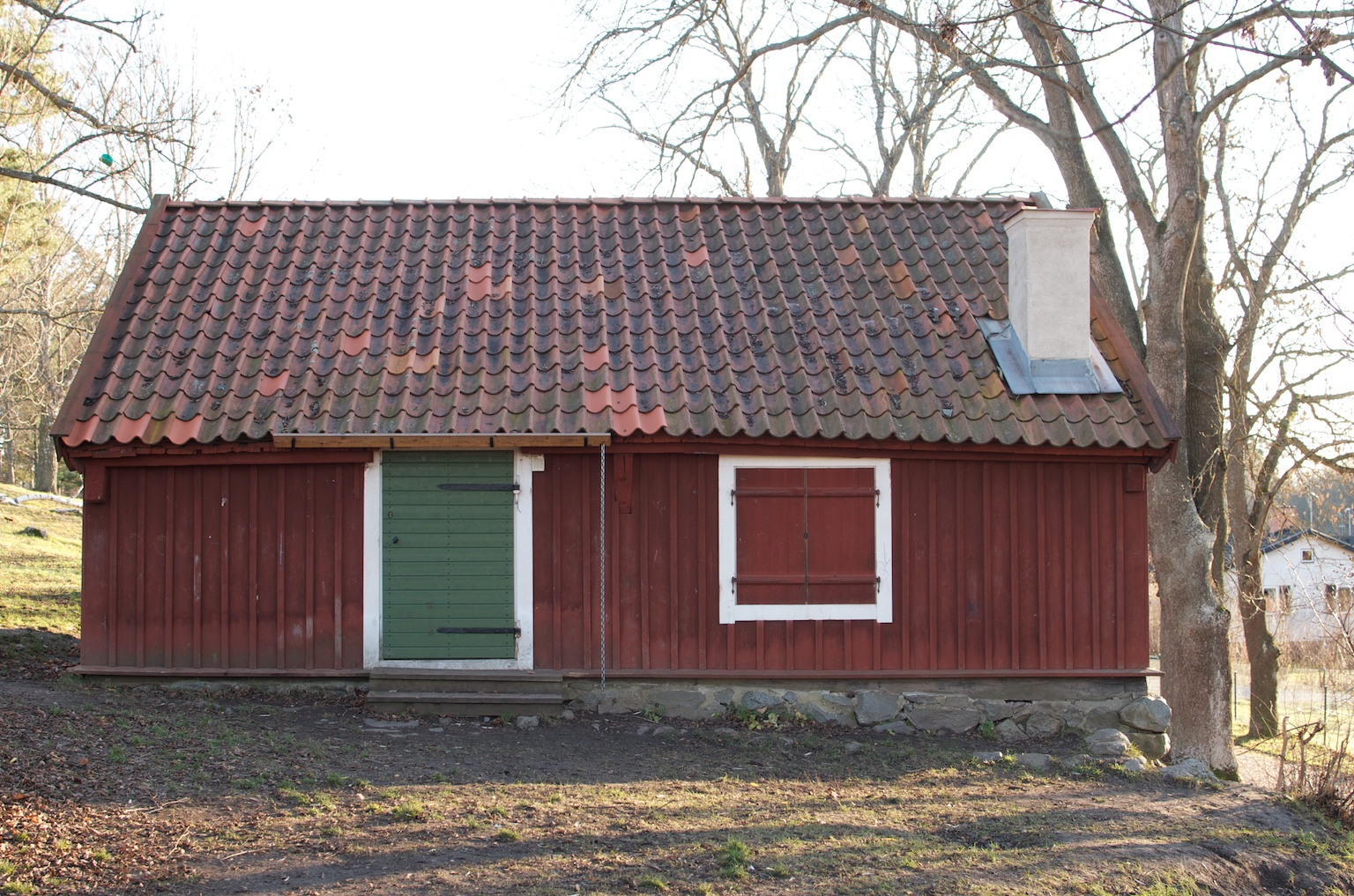 Arbetarbostaden Grytan på Skälby gård i Järfälla.